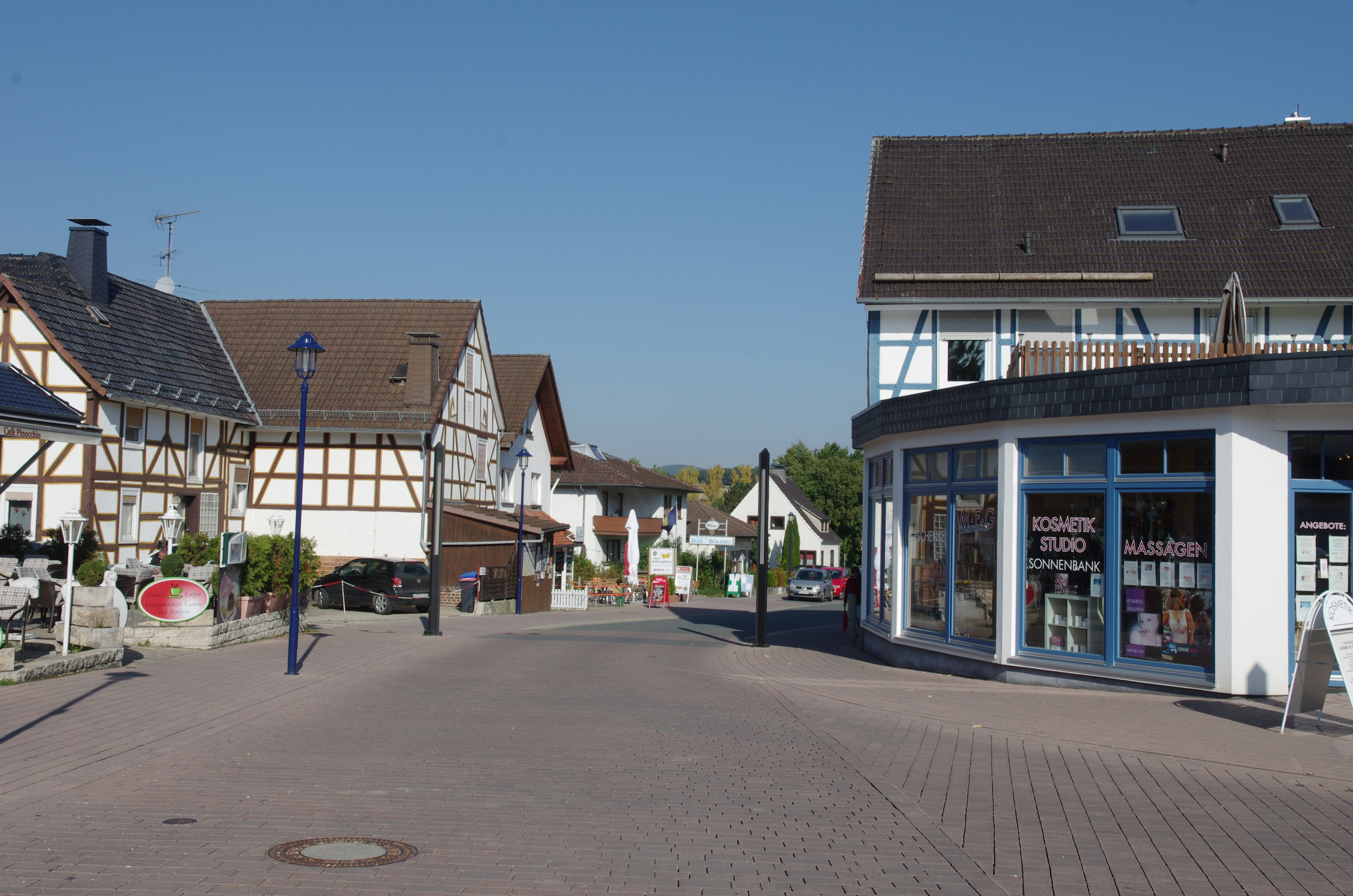 Bad Wildungen, Ortsteil Reinhardshausen in Hessen. Die Günter-Hartenstein-Straße ist eine der Hauptstraßen von Reihnhardshausen.